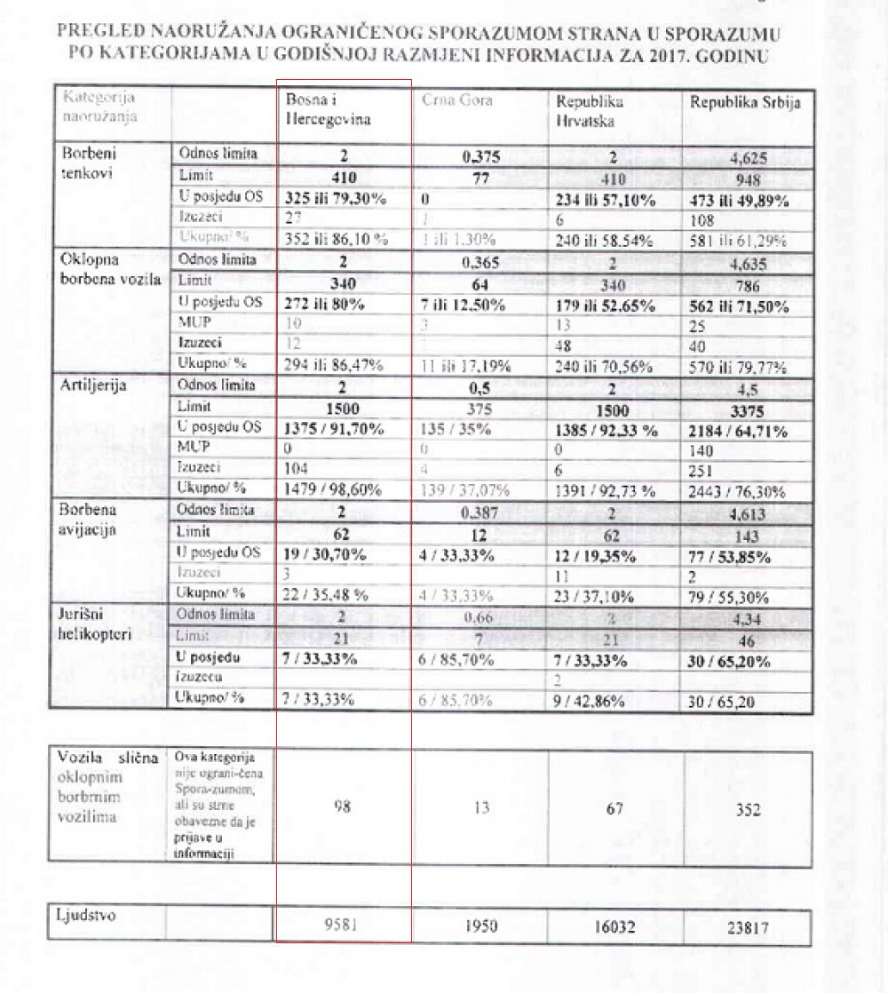 Pregled naoružanja ograničenog sporazumom strana po kategorijama, a na osnovu sporazuma o subregionalnoj kontroli naoružanja potpisanog u Firenci 1996. godine.